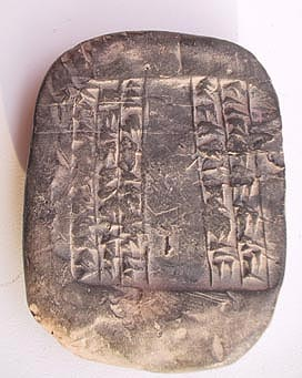 Replik einer Tontafel mit Keilschrift, vermutlich eine Gesetzestafel des Königs Hammurabi, Rückseite, Größe 5 x 7,5 cm